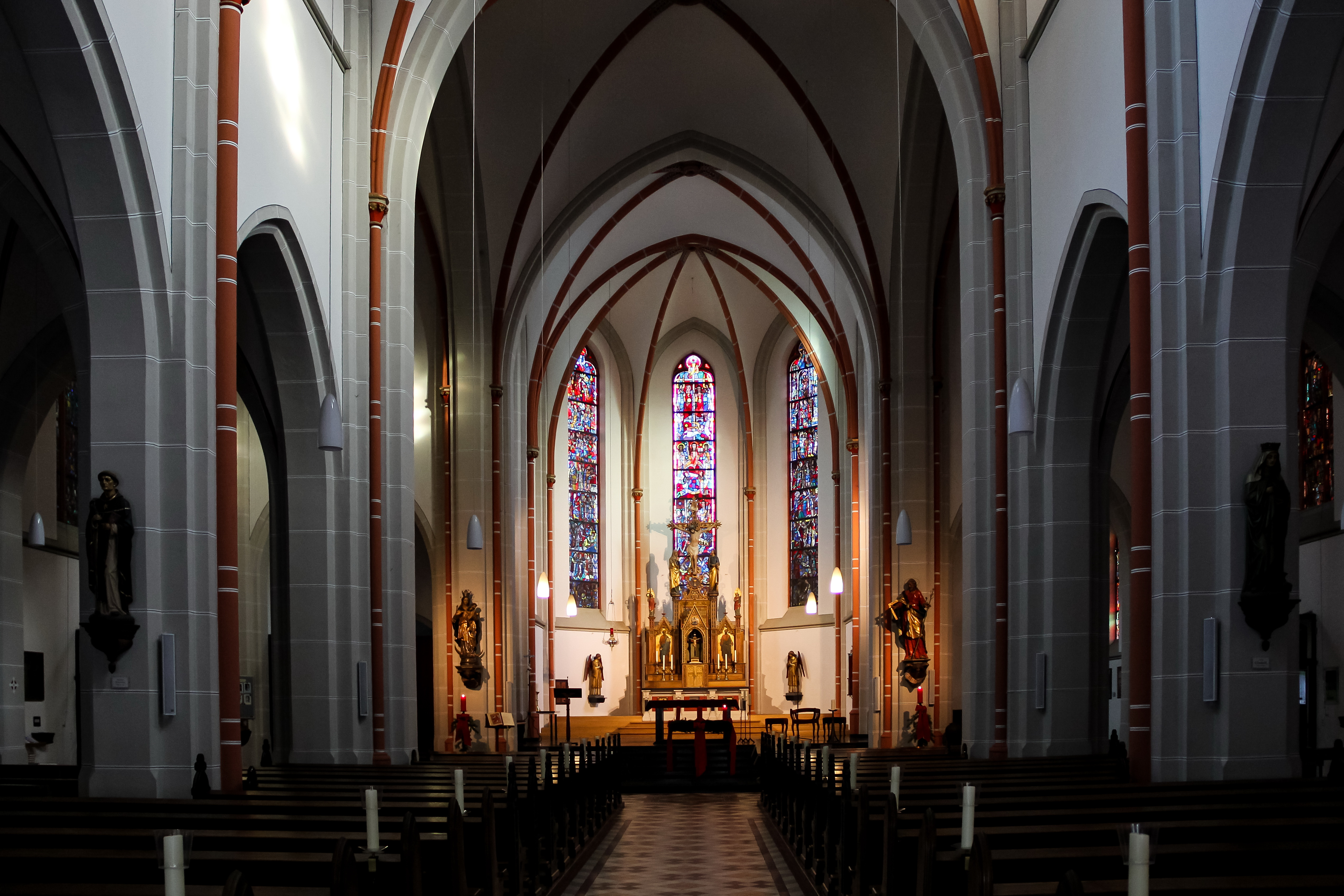 Innenansicht der katholische Pfarrkirche Sankt Josef in Beuel.